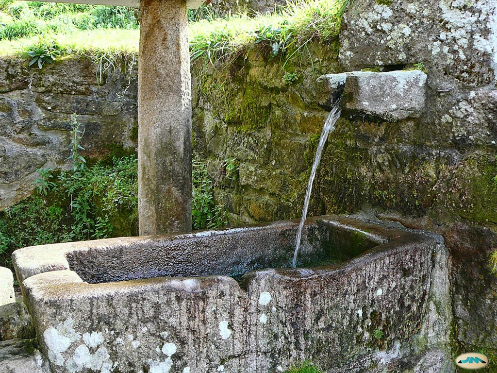 Tomeza, Pontevedra-Lavadoiro